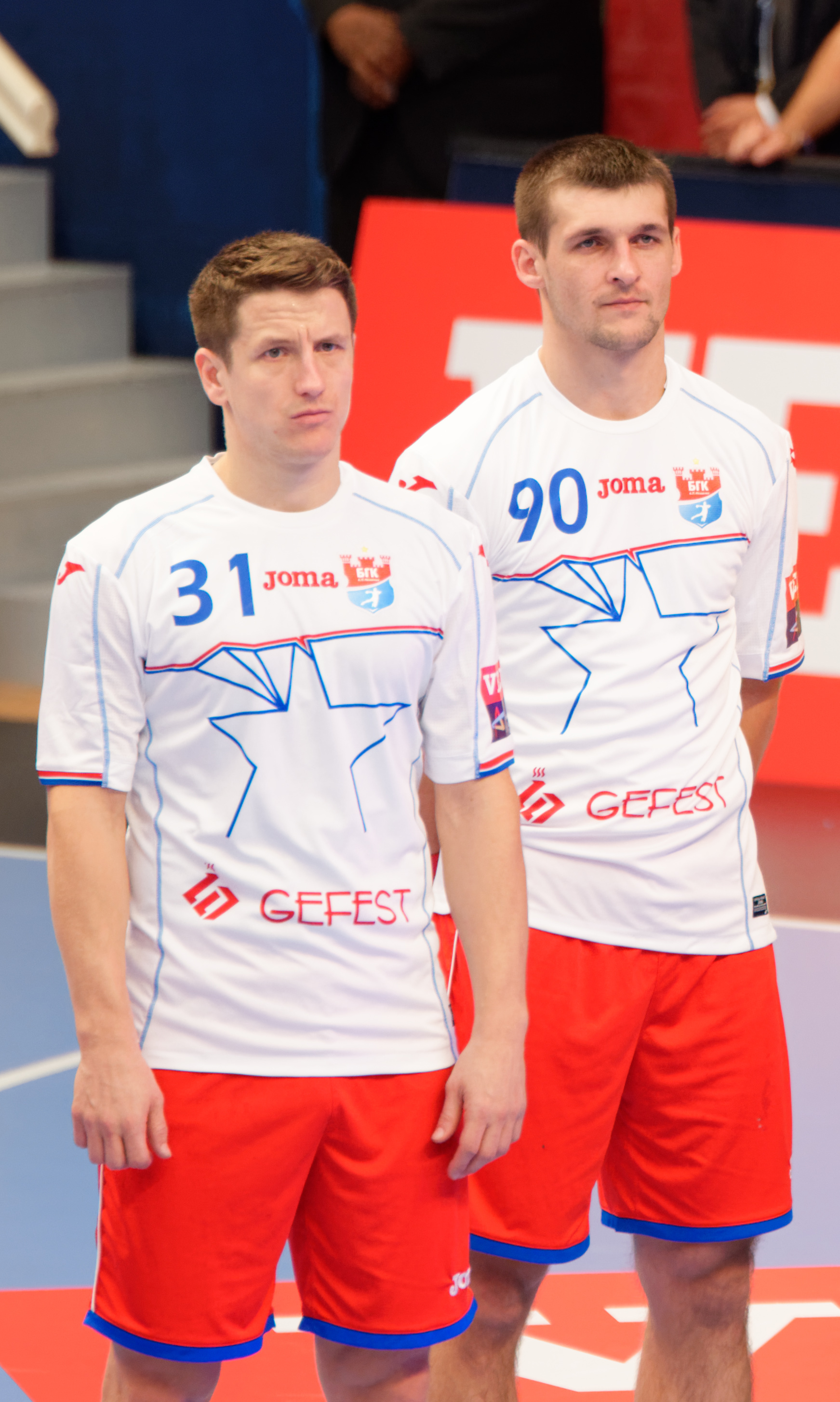 Rencontre de phase de groupe de la ligue des champions 2017/18 entre le PSG et Meshkov Brest A Coubertin le 24 septembre 2017.